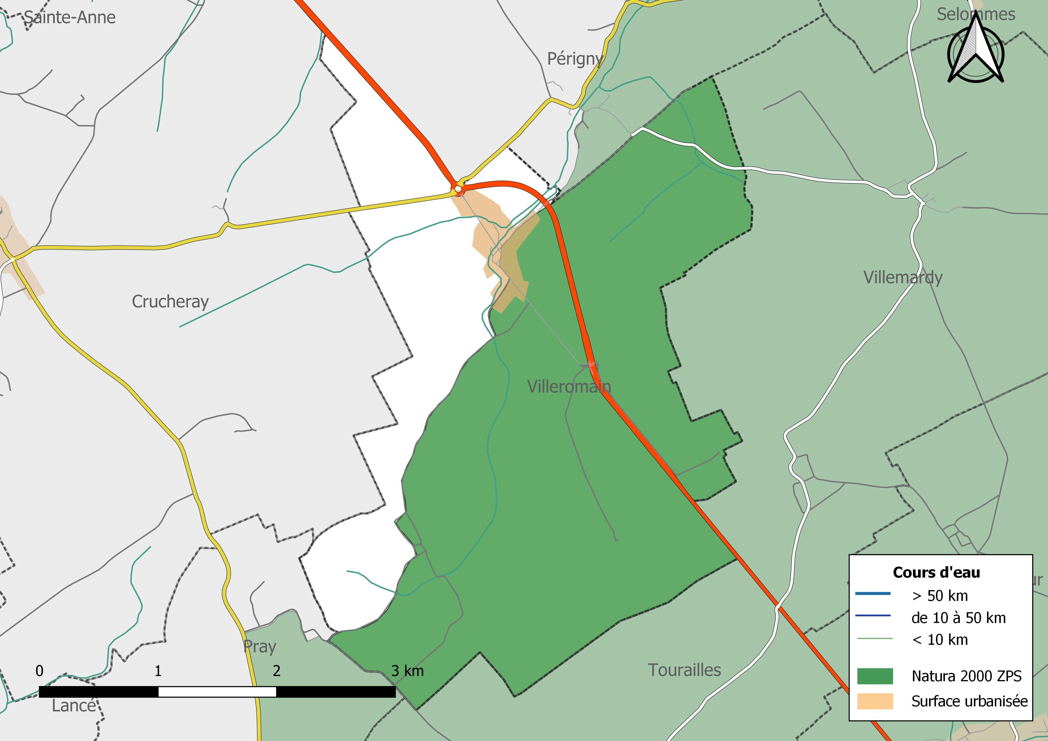 Carte du site Natura 2000 de type ZPS de la commune de Villeromain (France).